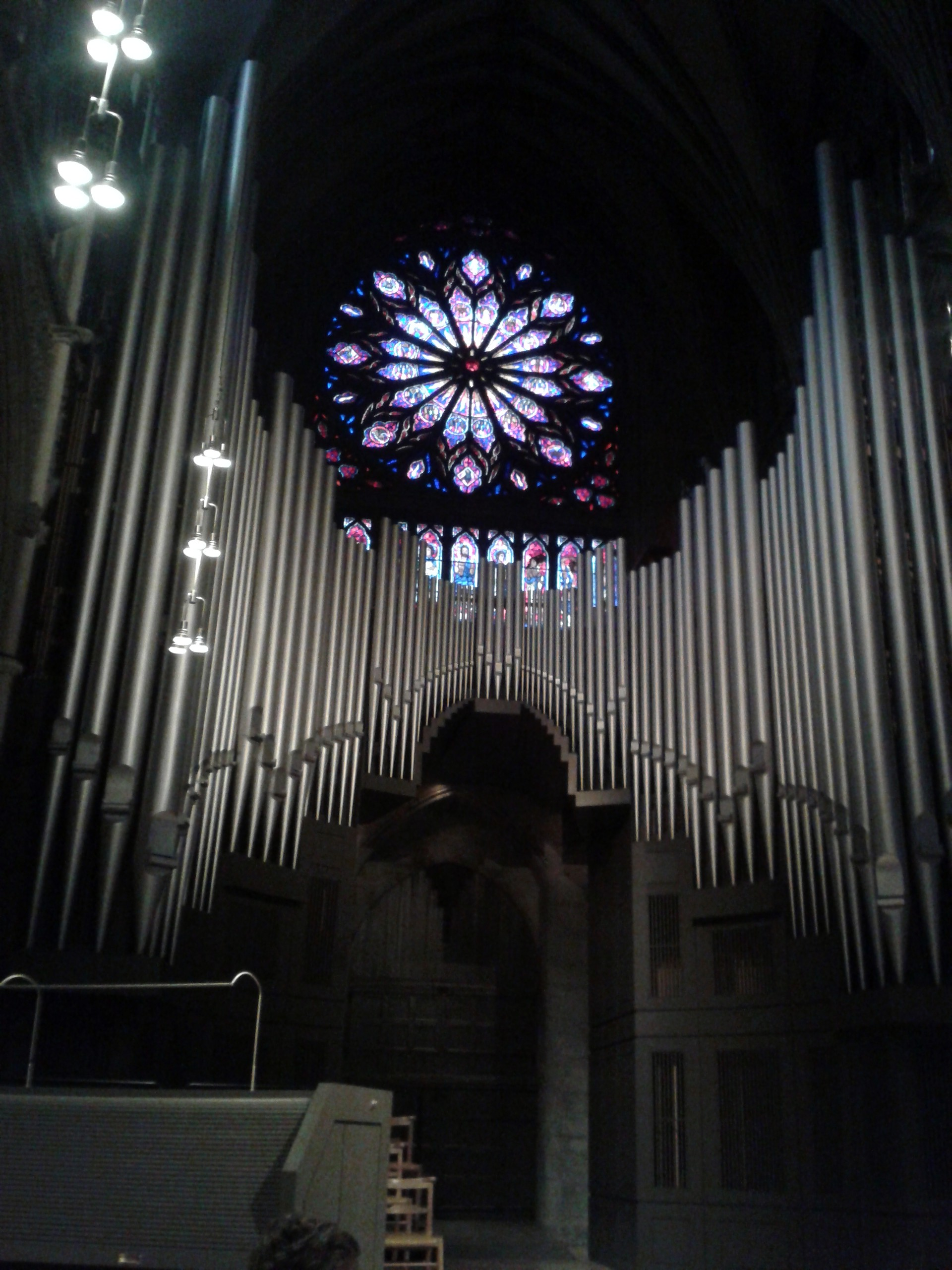 Steinmeyerorgel im Nidarosdom, Trondheim